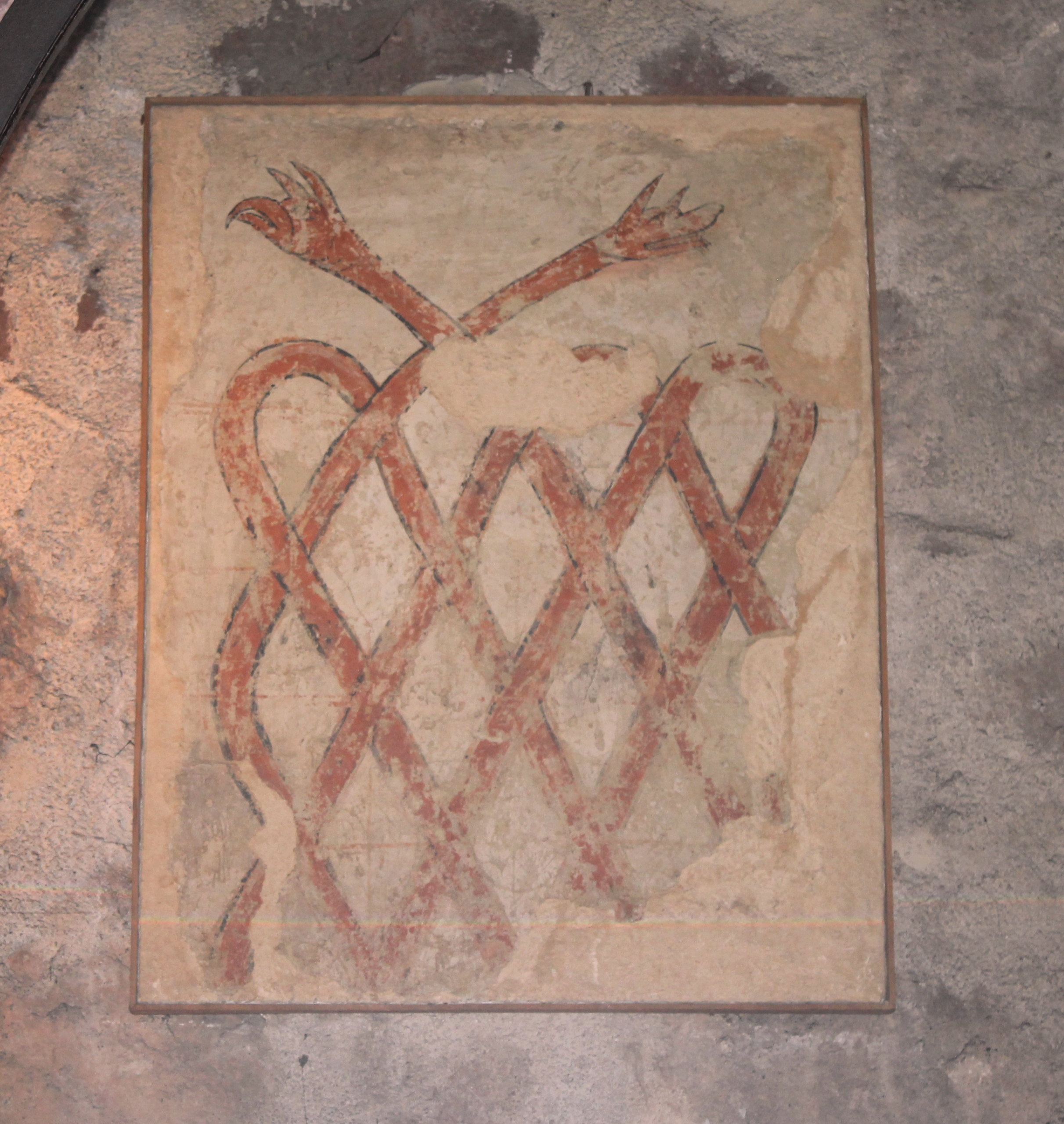 Amfisbena. Pintura romànica de l'Església de Sant Martí de Puig-reig, simbologia molt antiga, possiblement relacionada amb el catarisme.